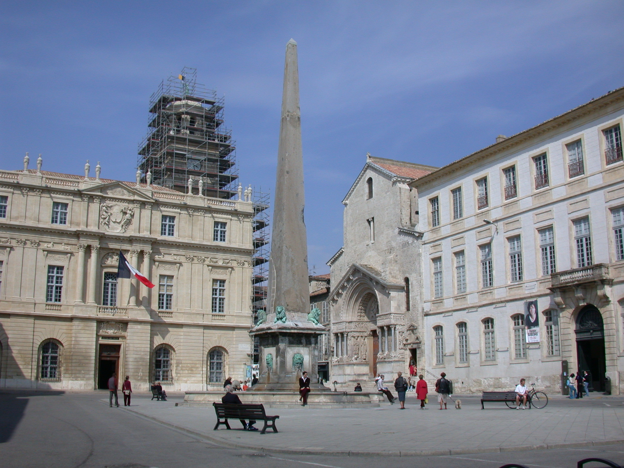 Arles (Francia), piazza della Repubblica, con municipio e facciata della chiesa di Saint-Trophime. Foto personale aprile 2005